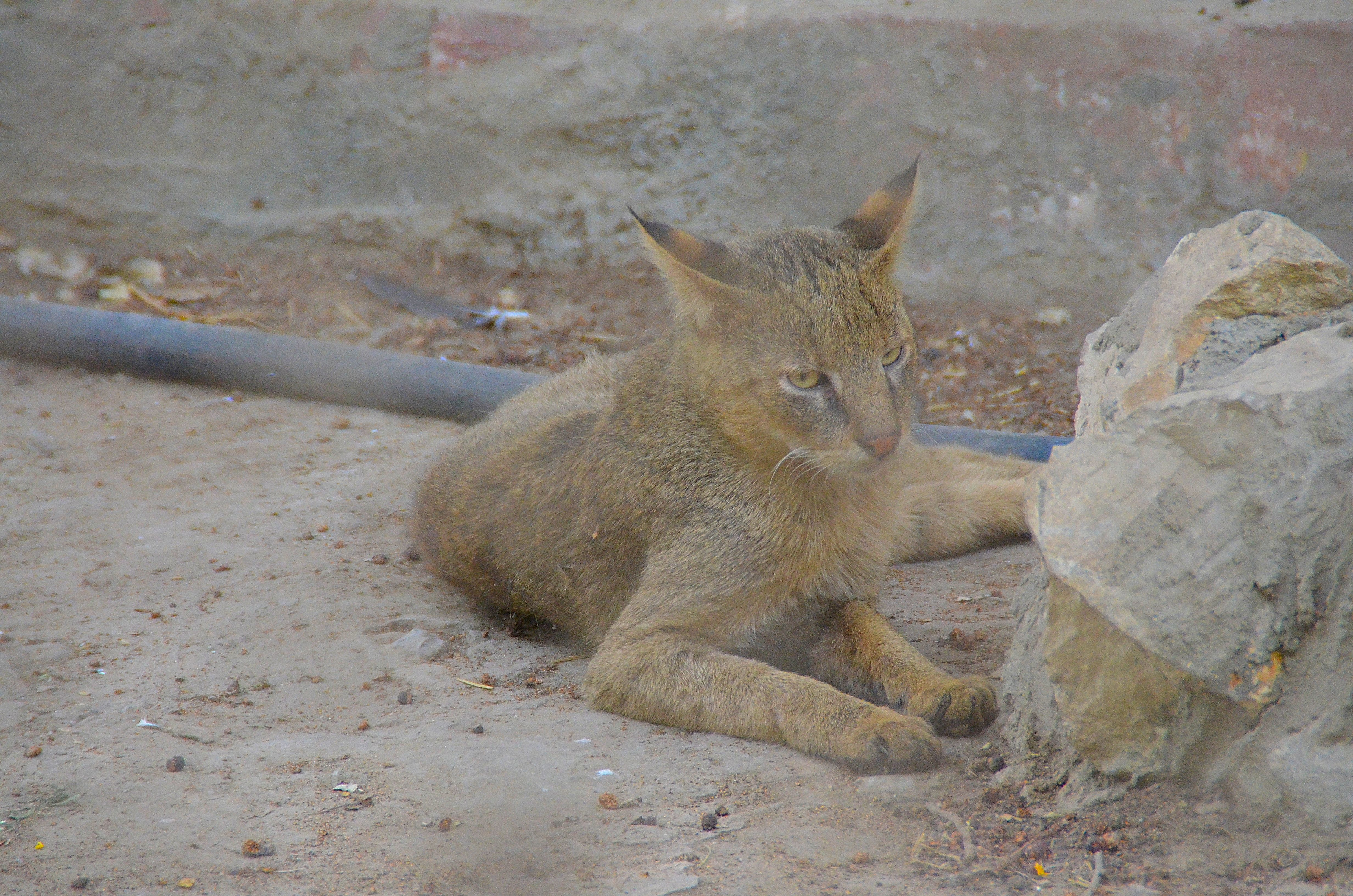 قط بري في حديقة حيوان الجيزة Felis chaus nilotica